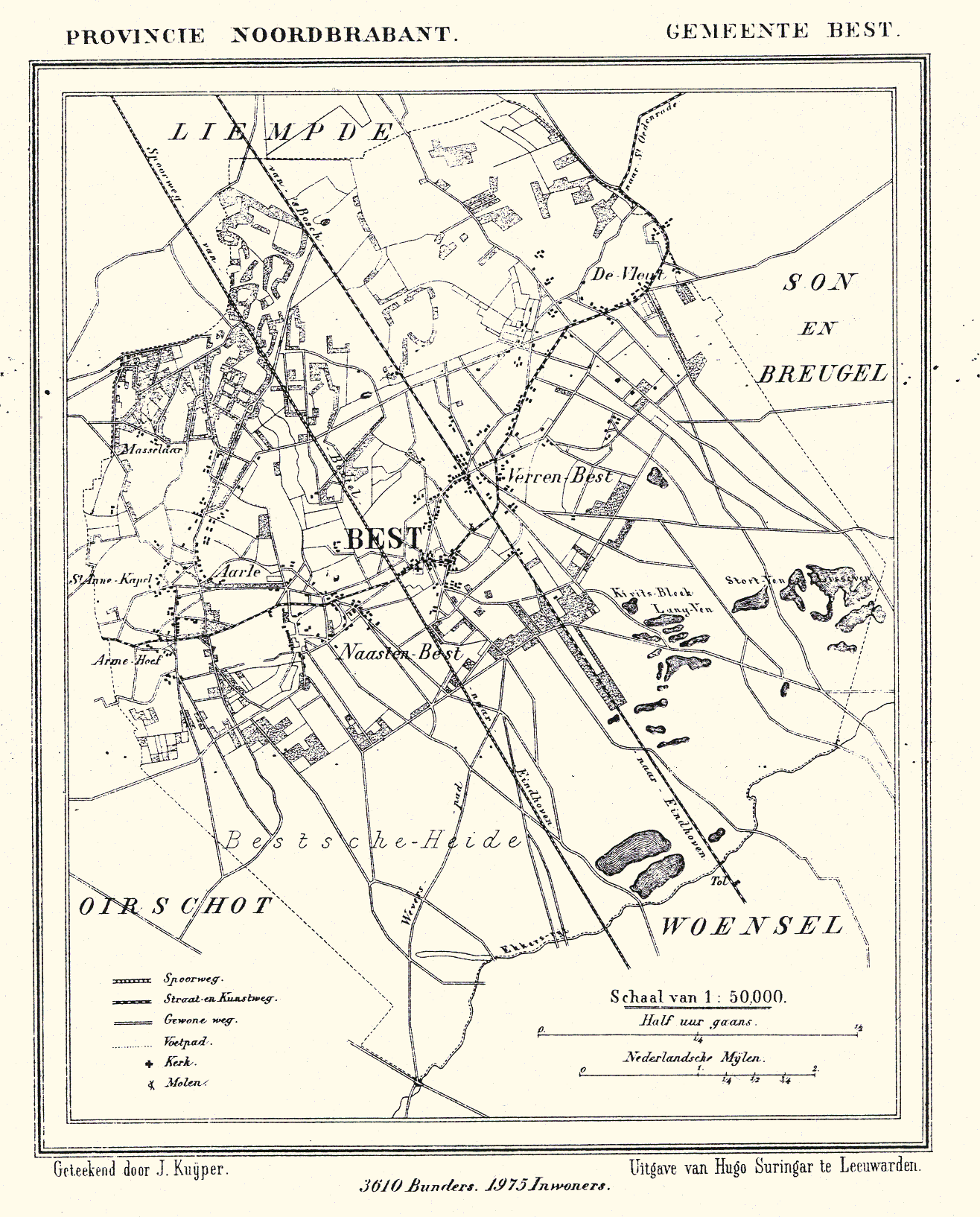 Nederland, Noord-Brabant, Gemeente Best